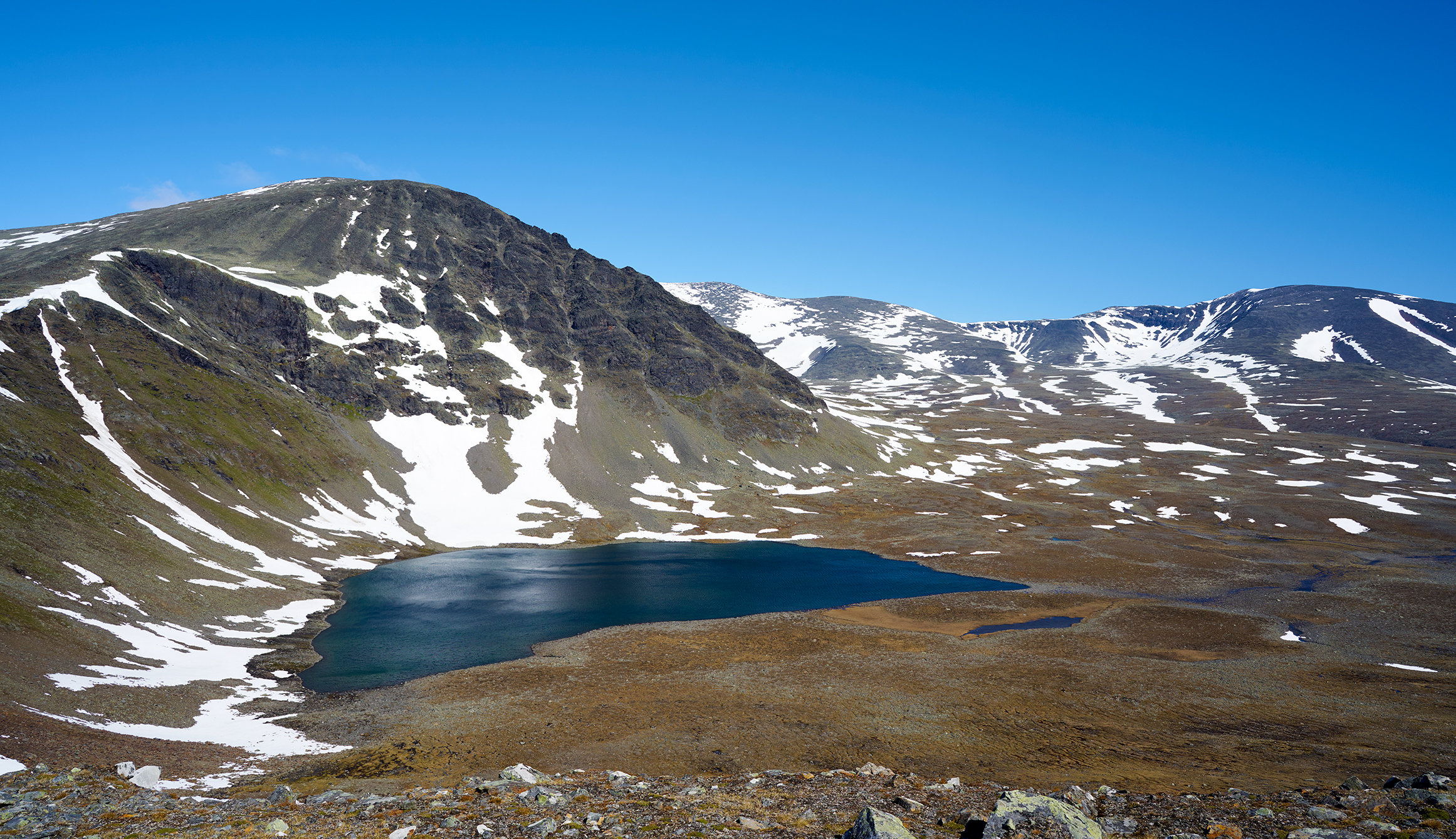 Tjievrra och Tjievrajávrre. Vy från Sähkok.